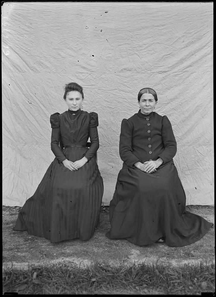 Reproduction numérique de l’œuvre Ninotte Boyer et sa fille réalisée par Félix Arnaudin le 04 décembre 1898 selon la technique du gélatino bromure d'argent sur plaque de verre (18 x 13 cm).